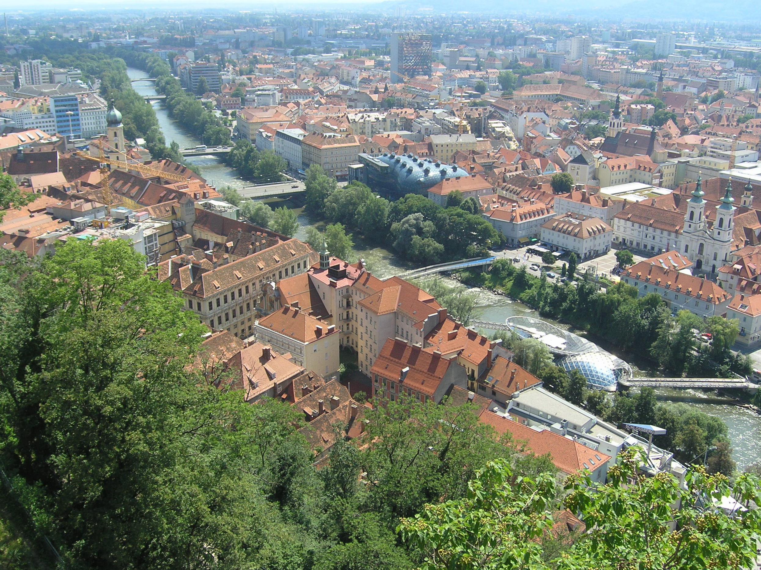 Graz vista desde el Schlossberg